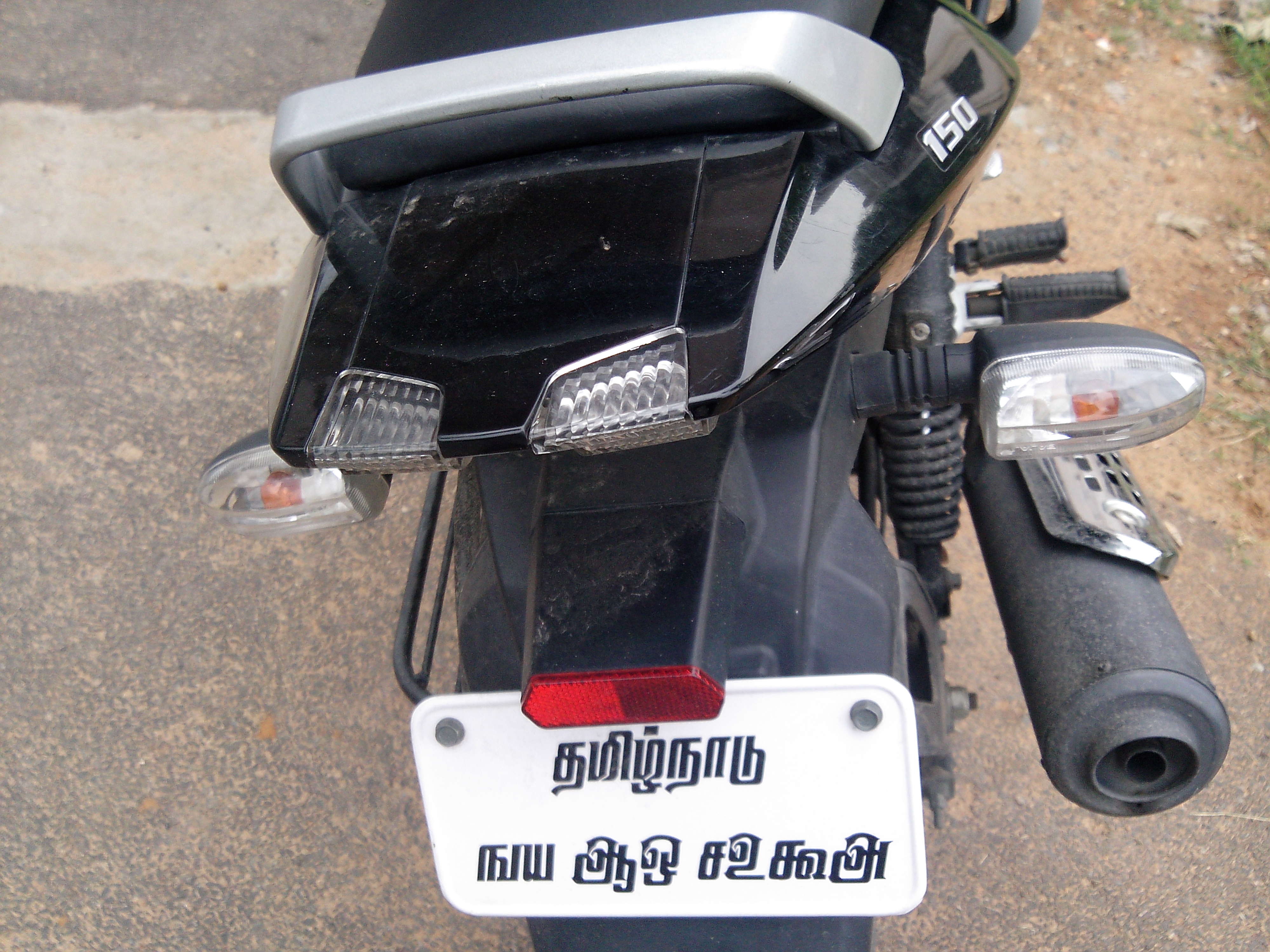 துள்ளுந்தில் தமிழ் எண் எழுத்தப்பட்டுள்ள படம். சேலம், தமிழ்நாடு, இந்திய ஒன்றியம்.